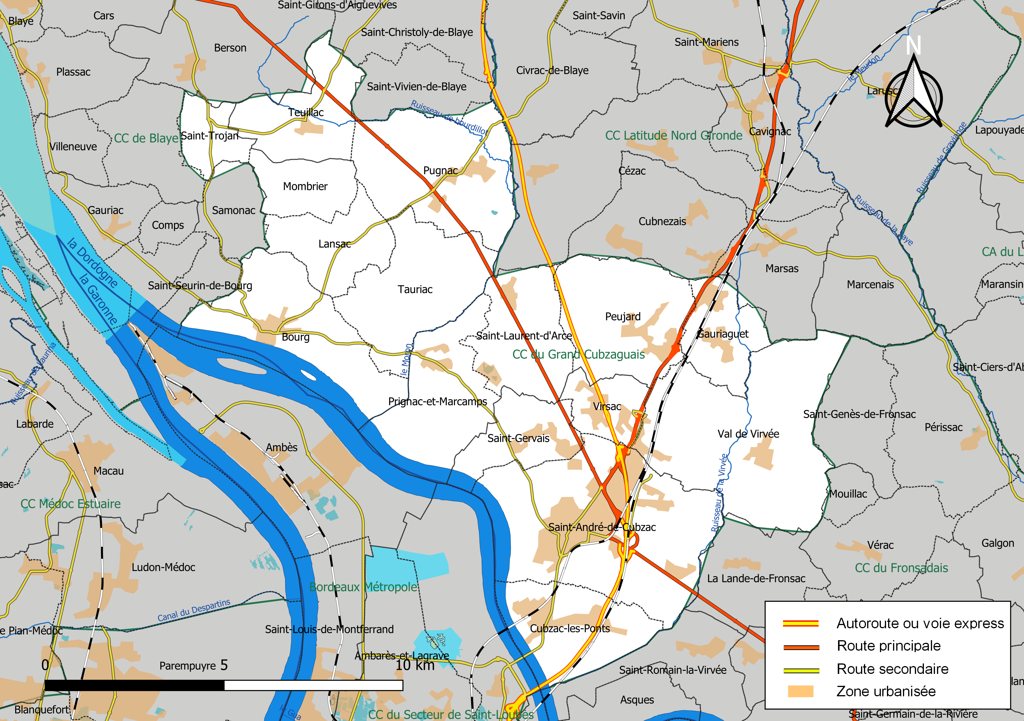 Carte géographique de la Communauté de communes du Grand Cubzaguais, département de la Gironde, France. Composition au 1er janvier 2019.